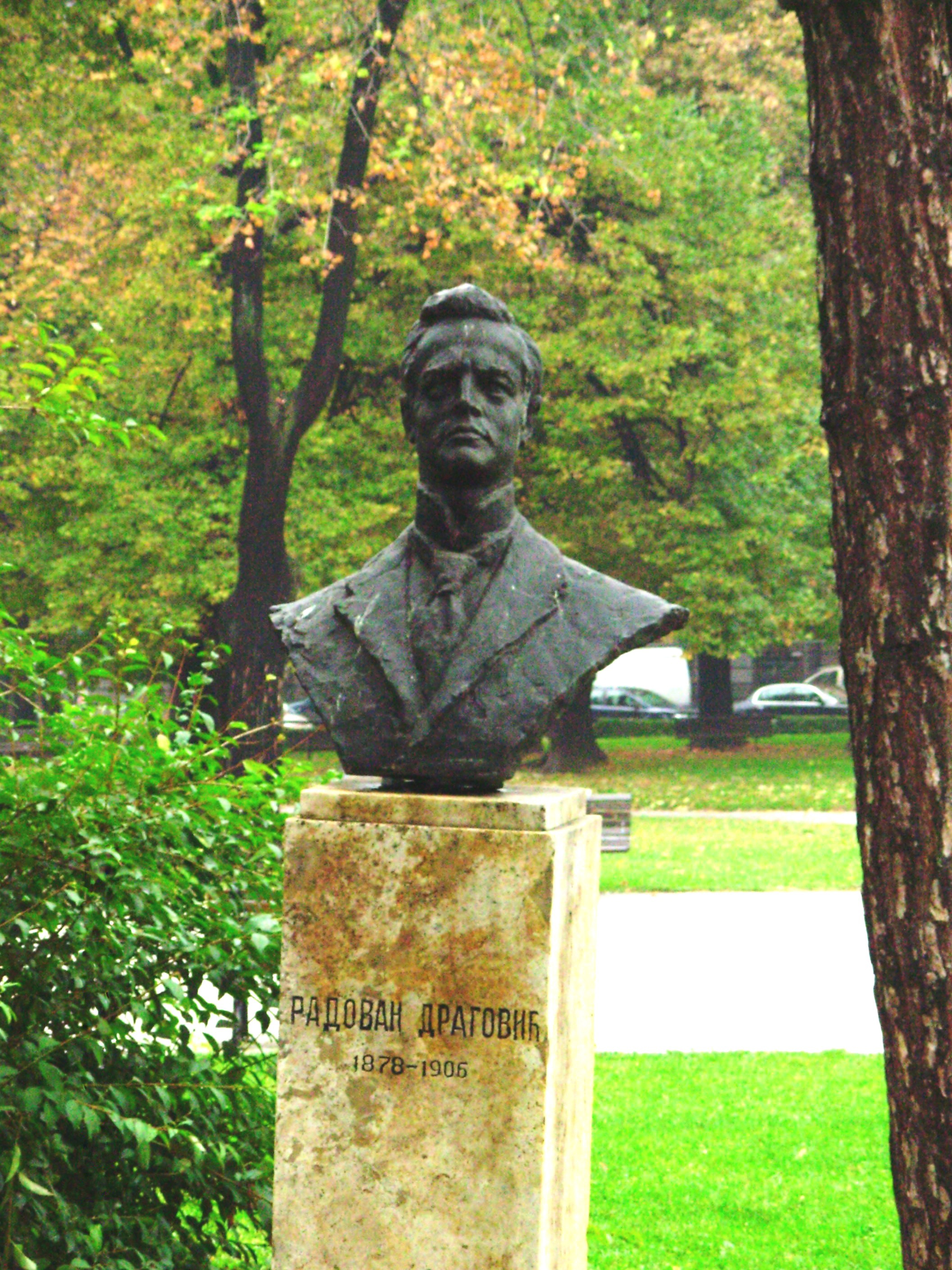 Биста Радована Драговића у парку Мањеж, Београд. Сликао Голдфингер